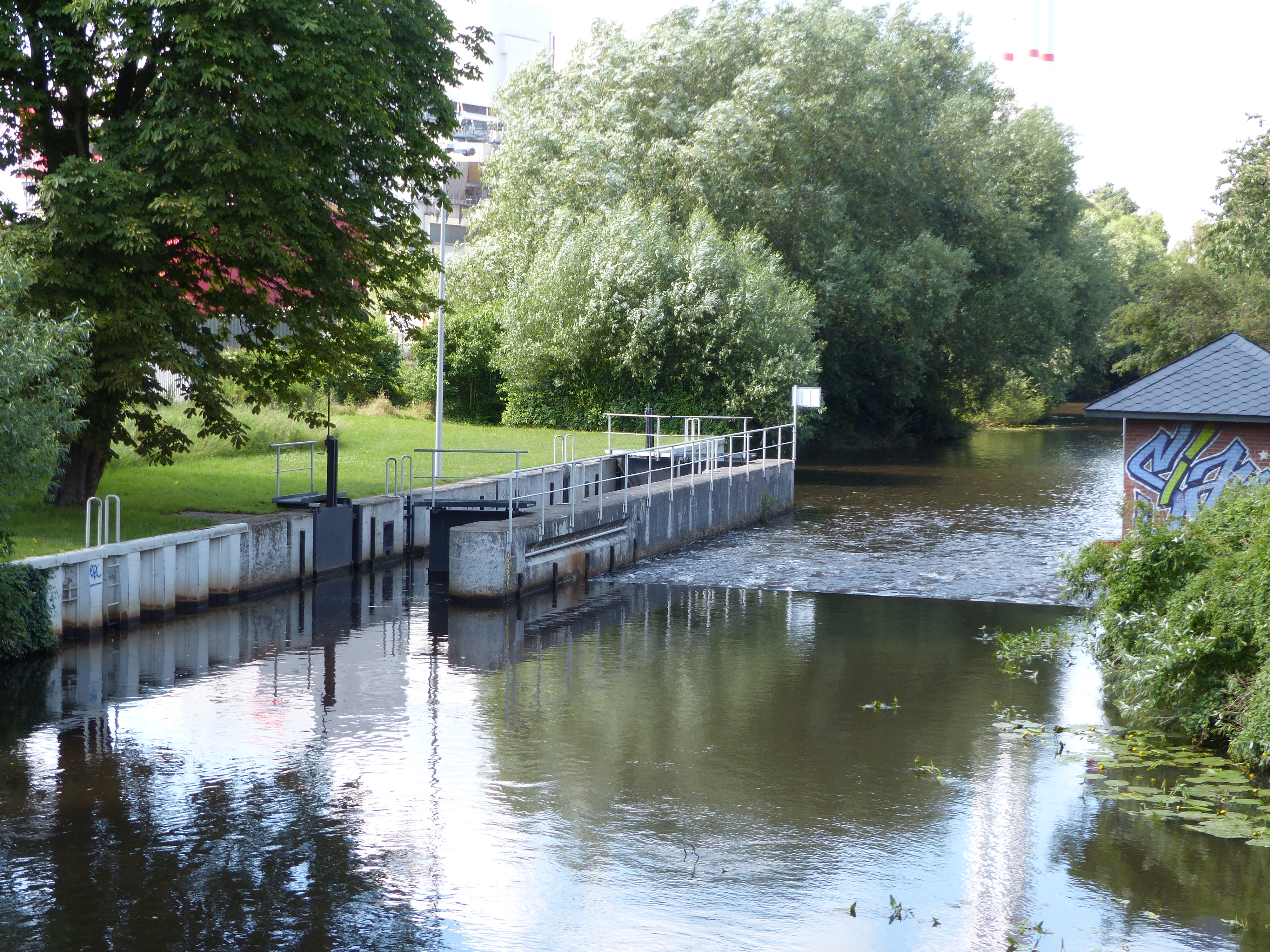 (neuer) Gehrkenstau der Kleinen Wümme in Bremen, gesehen von der Brücke des Hochschulrings